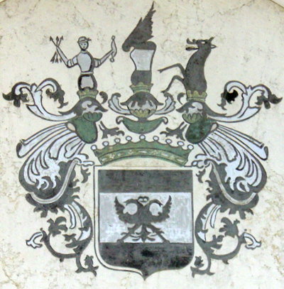 Stemma della famiglia di Colloredo Mels, presente sulla lastra tombale all'interno del cimitero monumentale di Udine.